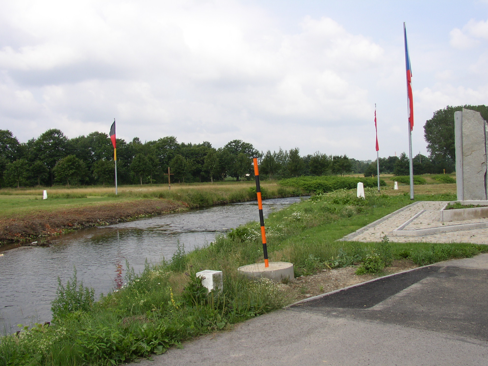 Trojmezí v Hrádku nad Nisou. Česko (v popředí} - Německo (vlevo za Lužickou Nisou} - Polsko (v pozadí vpravo za Oldřichovským potokem)